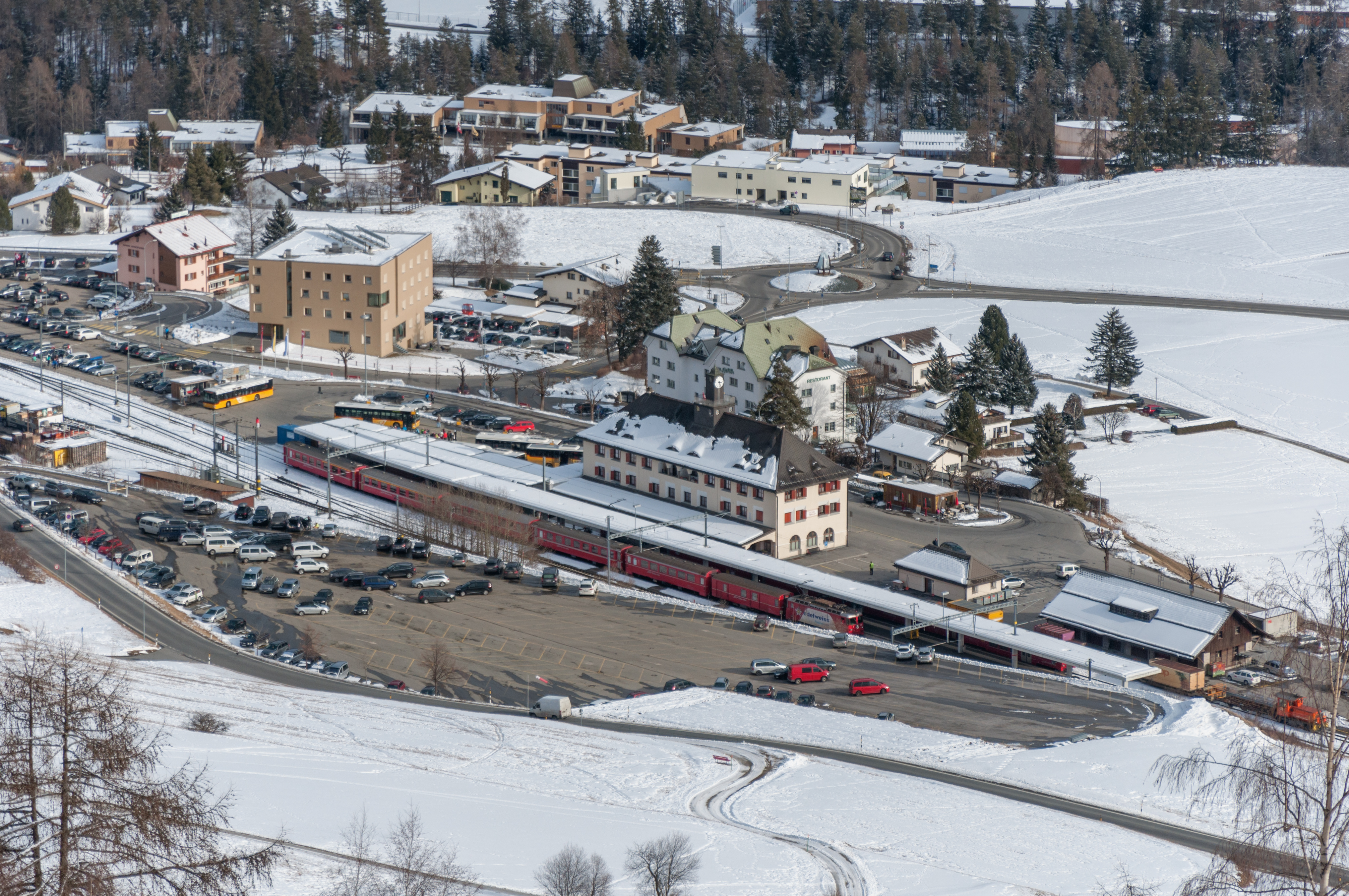 Switzerland, Graubünden, Scuol station